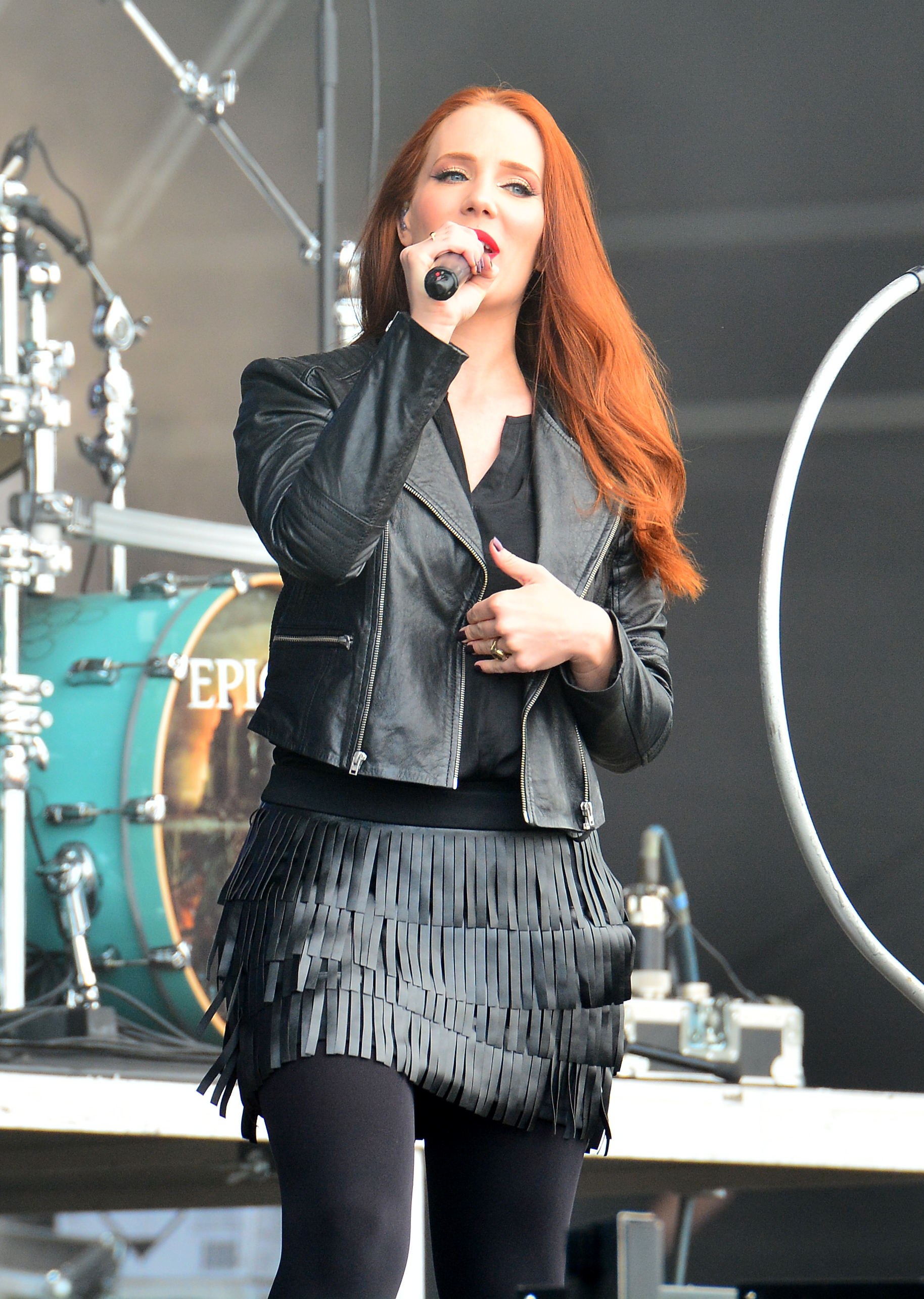 Epica beim Wacken Open Air 2015